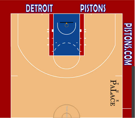 ピストンズホームコート配色